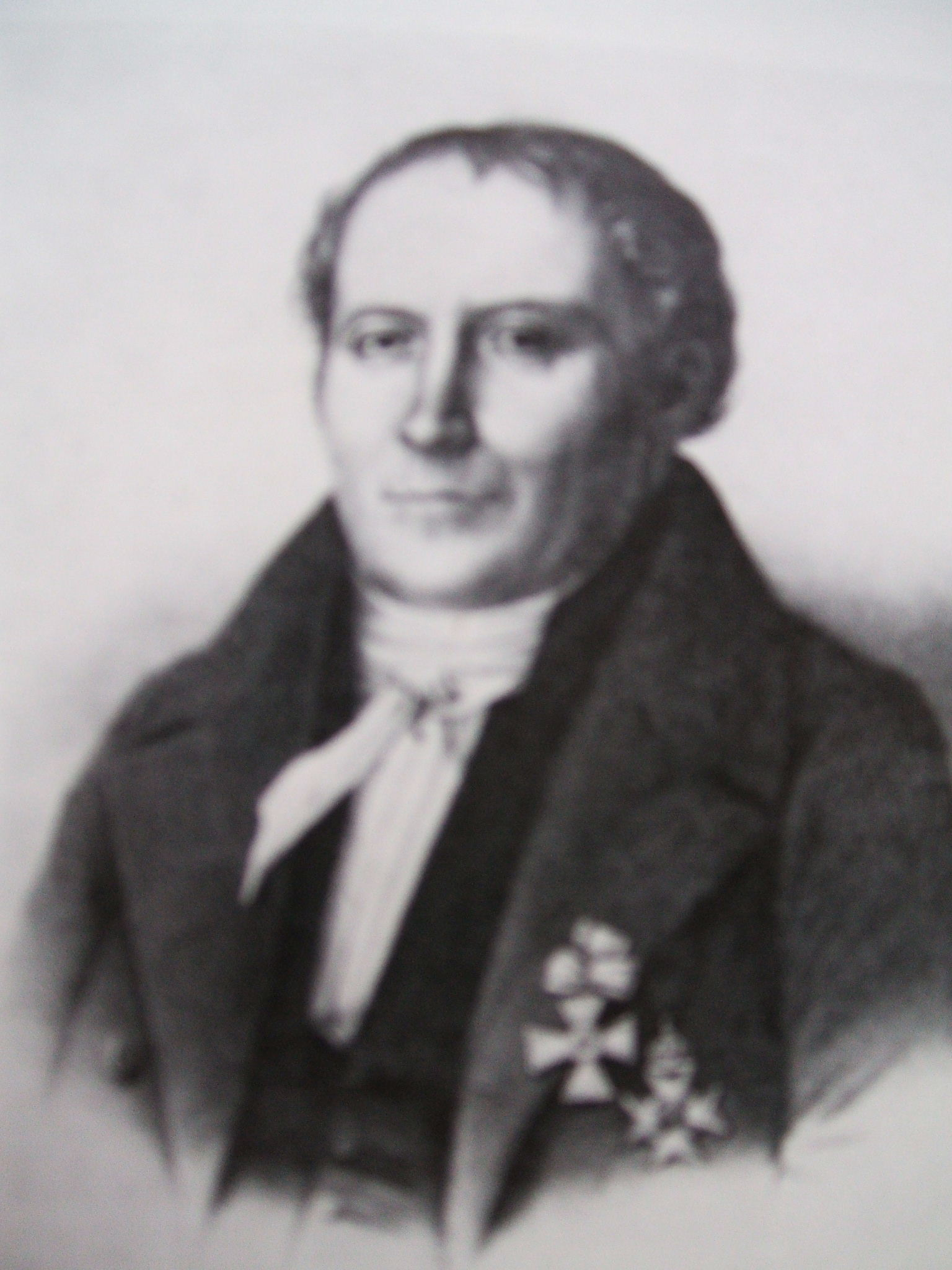 Das Foto zeigt G. C. Mohnike. Es handelt sich hier um eine Zeichnung von Albert Grell, Drcuk von L. Sachse, um 1850.